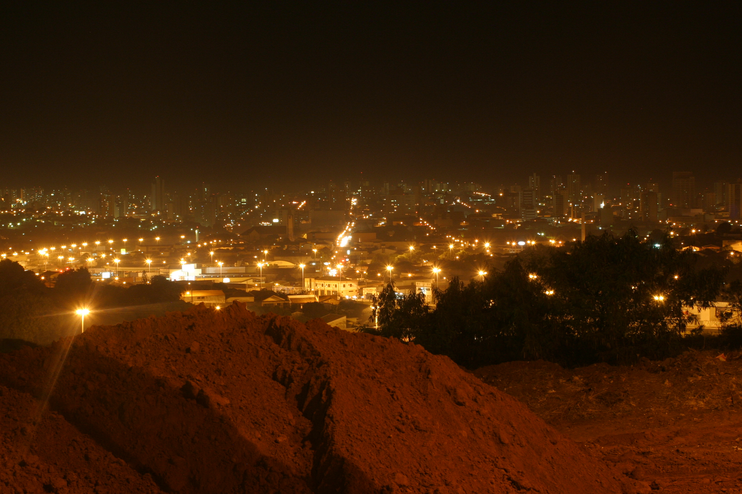 bauru - under construction